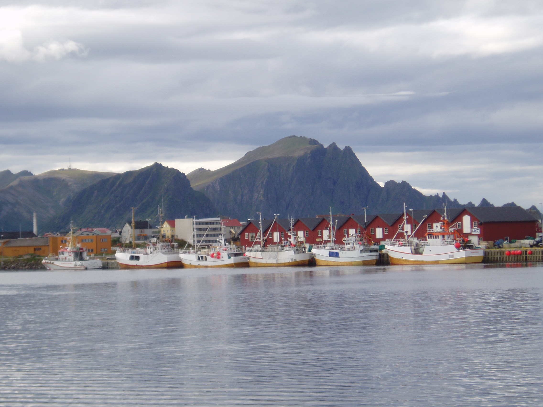 Andenes